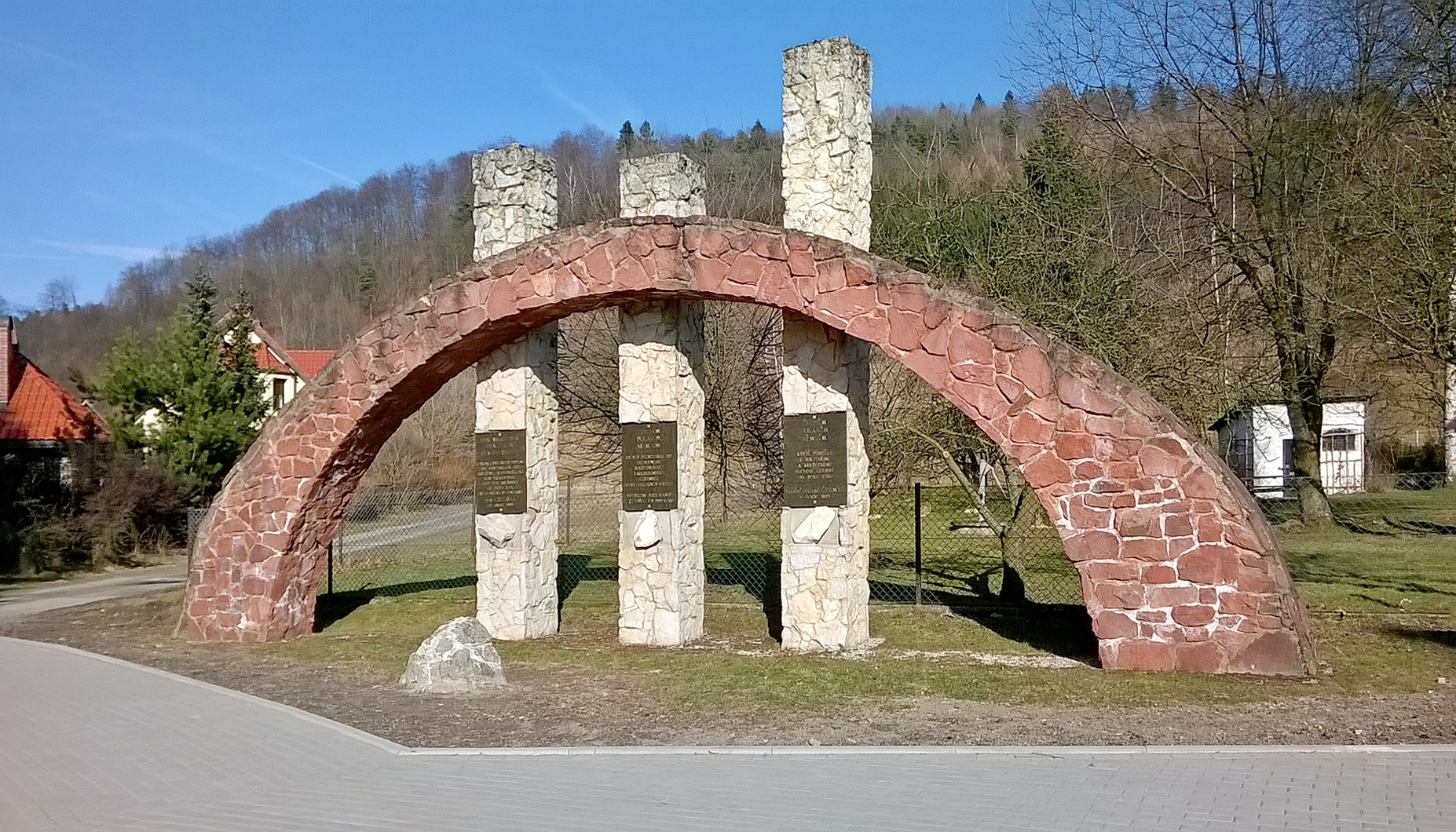 Czermna - památník věnovaný Čechům, Polákům a Němcům, kteří se v průběhu dějin zasloužili o rozvoj obce